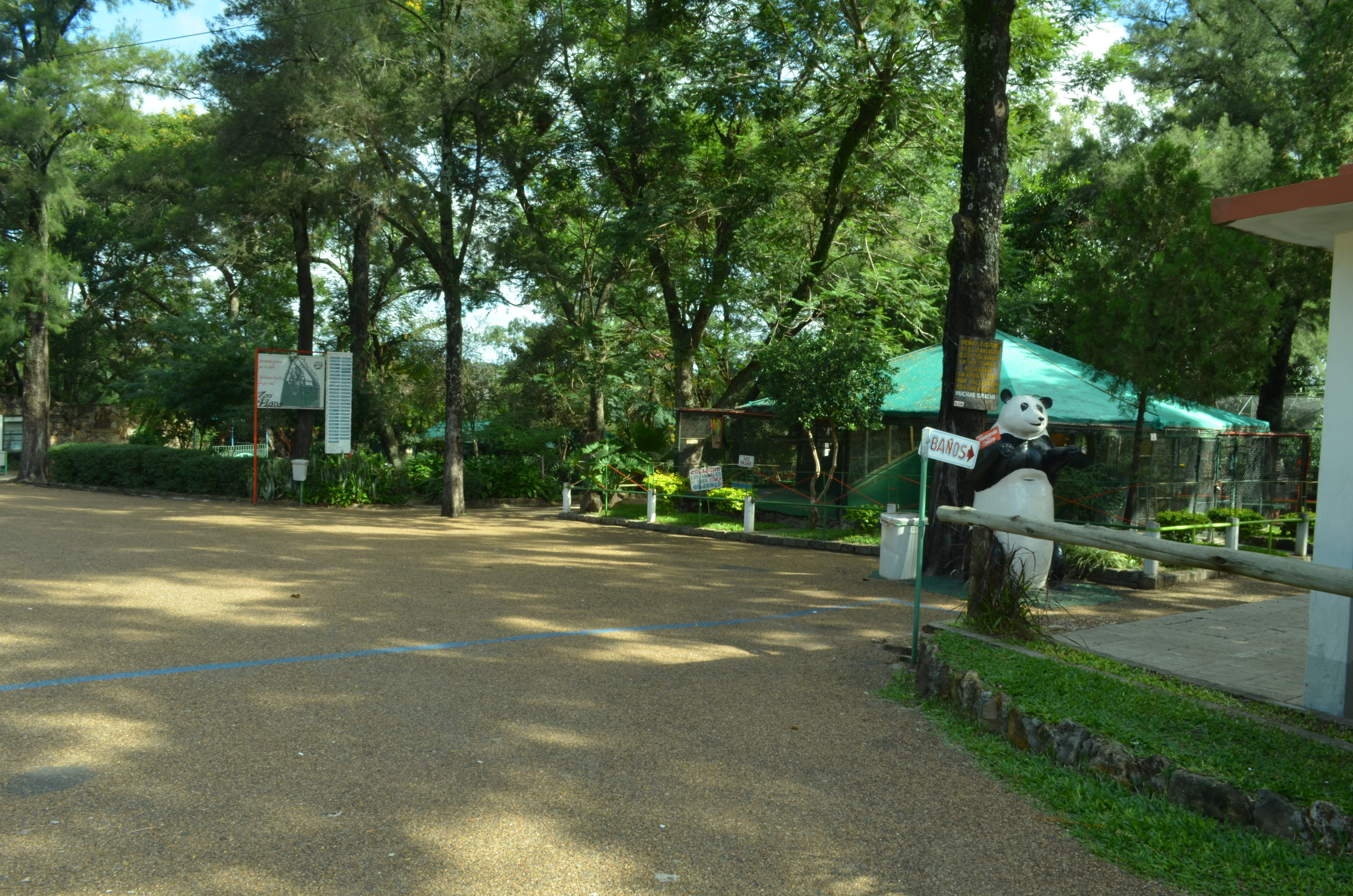 Imagen al ingresar al Zoológico de Salto a la derecha